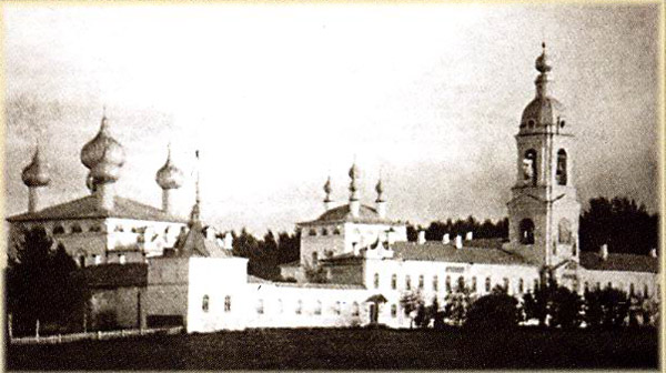 Адрианов Успенский мужской монастырь